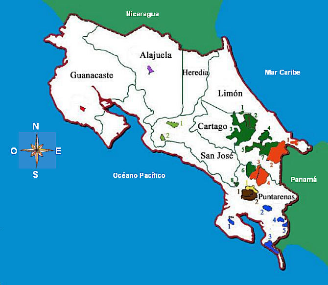 Mapa de las reservas indígenas de Costa Rica